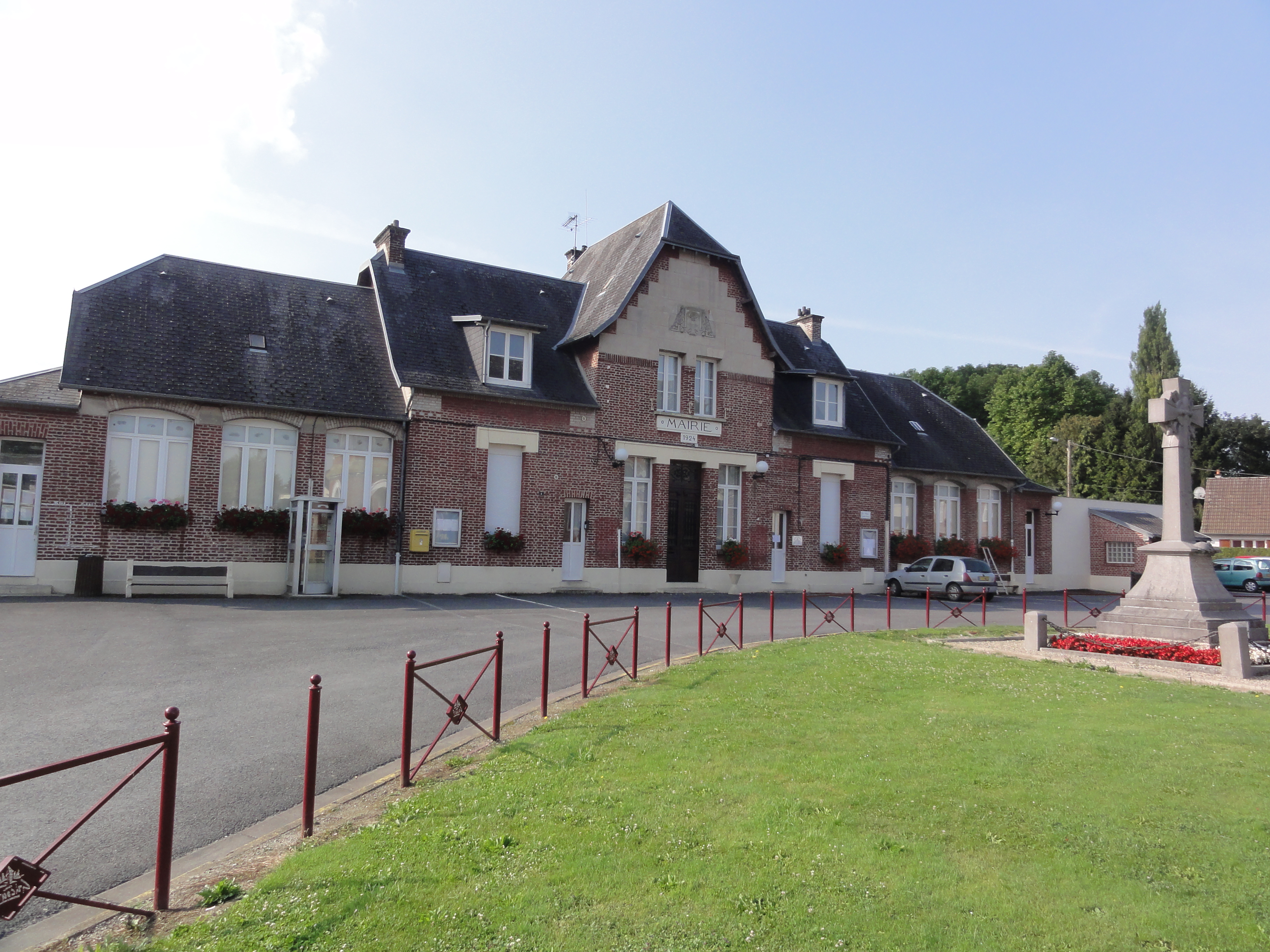 Gricourt (Aisne) mairie